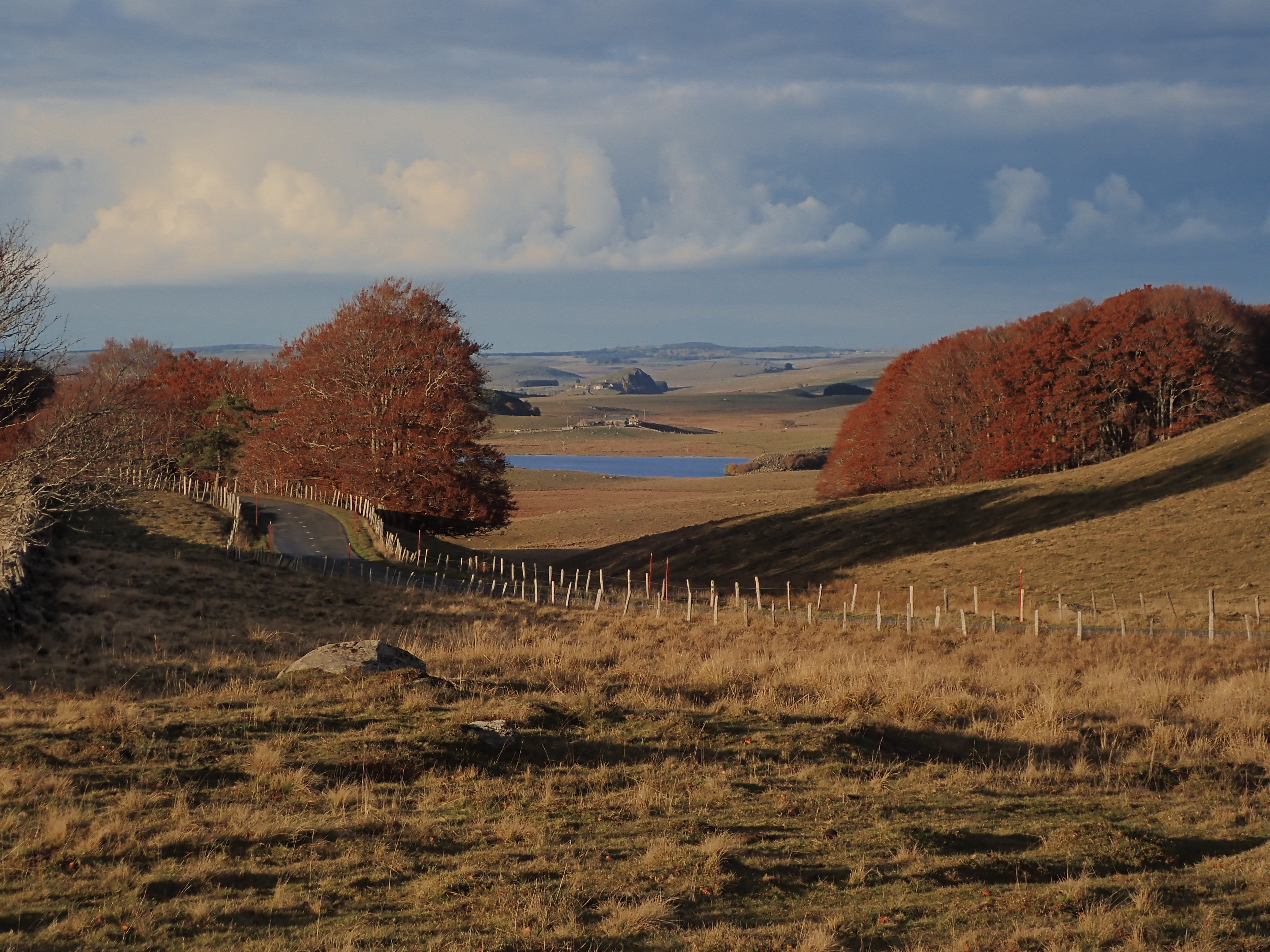 Le plateau de l'Aubrac en automne. Vue sur la route des Lacs, le lac de Born et le truc de Marchastel.